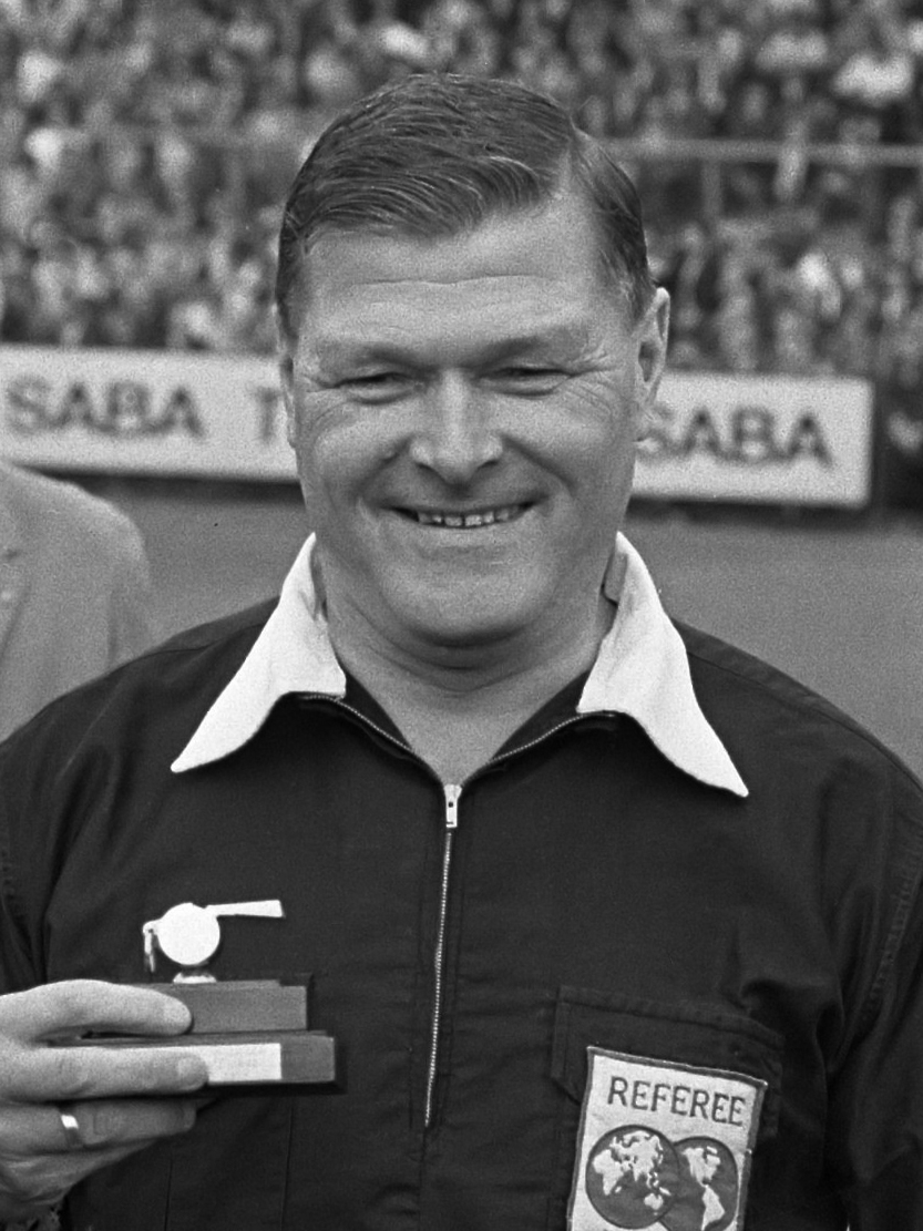 Ajax tegen Anderlecht. Scheidsrechter Piet Roomer werd gehuldigd 6 augustus 1967